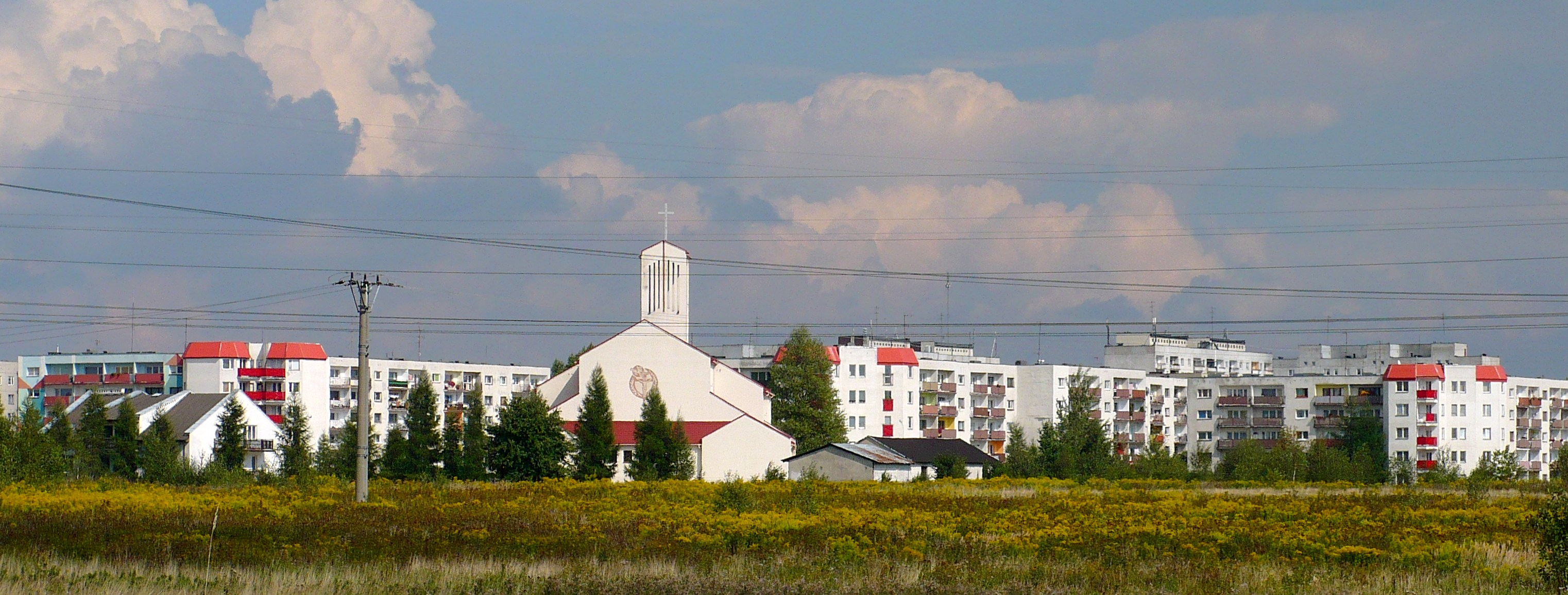 Widok na łódzkie osiedle Olechów od strony ulicy Olechowskiej. Po środku widoczny kościół parafialny parafii pw. św. Jana Ewangelisty w Łodzi.